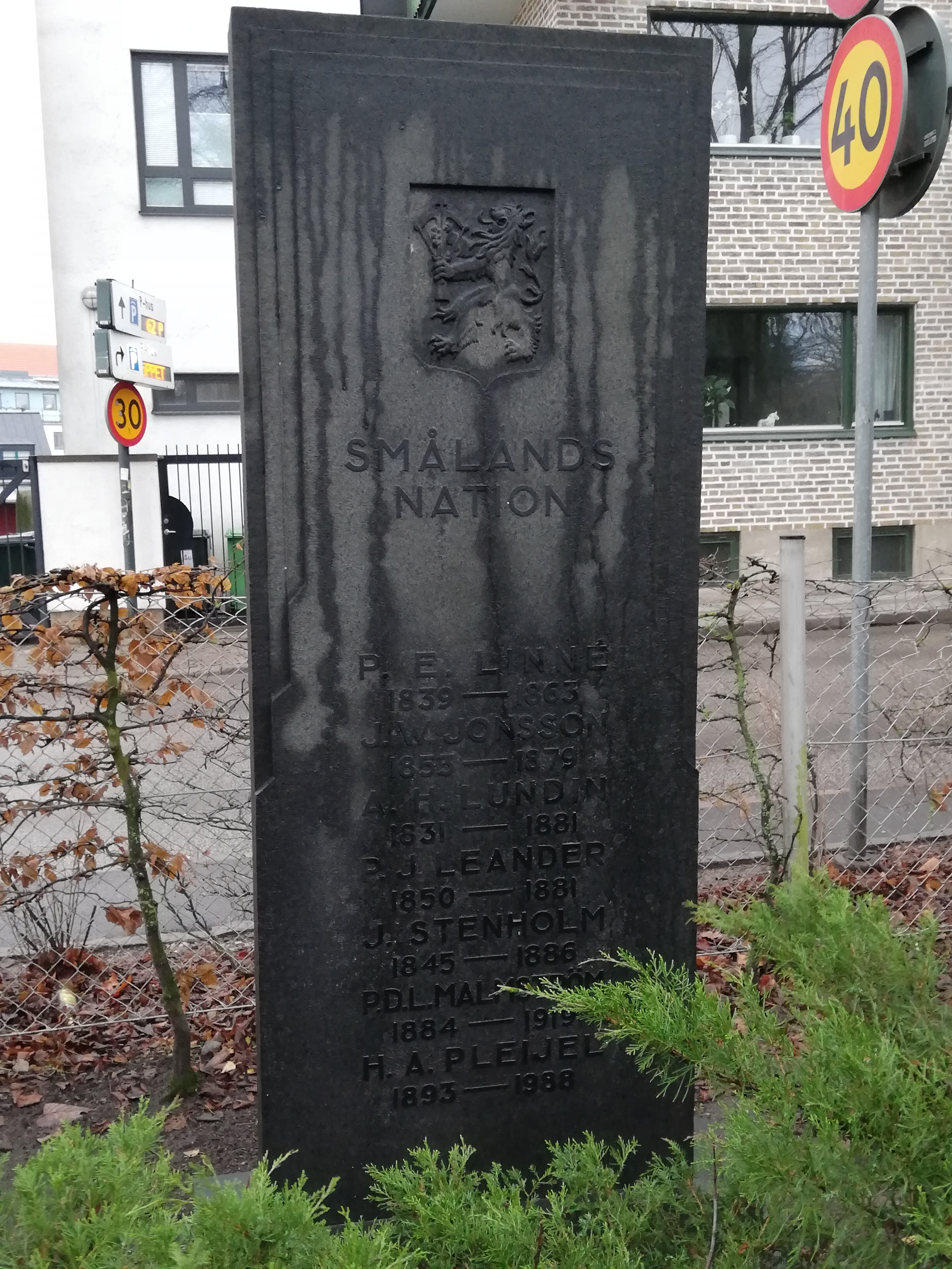 Smålands nations grav på Östra kyrkogården i Lund.